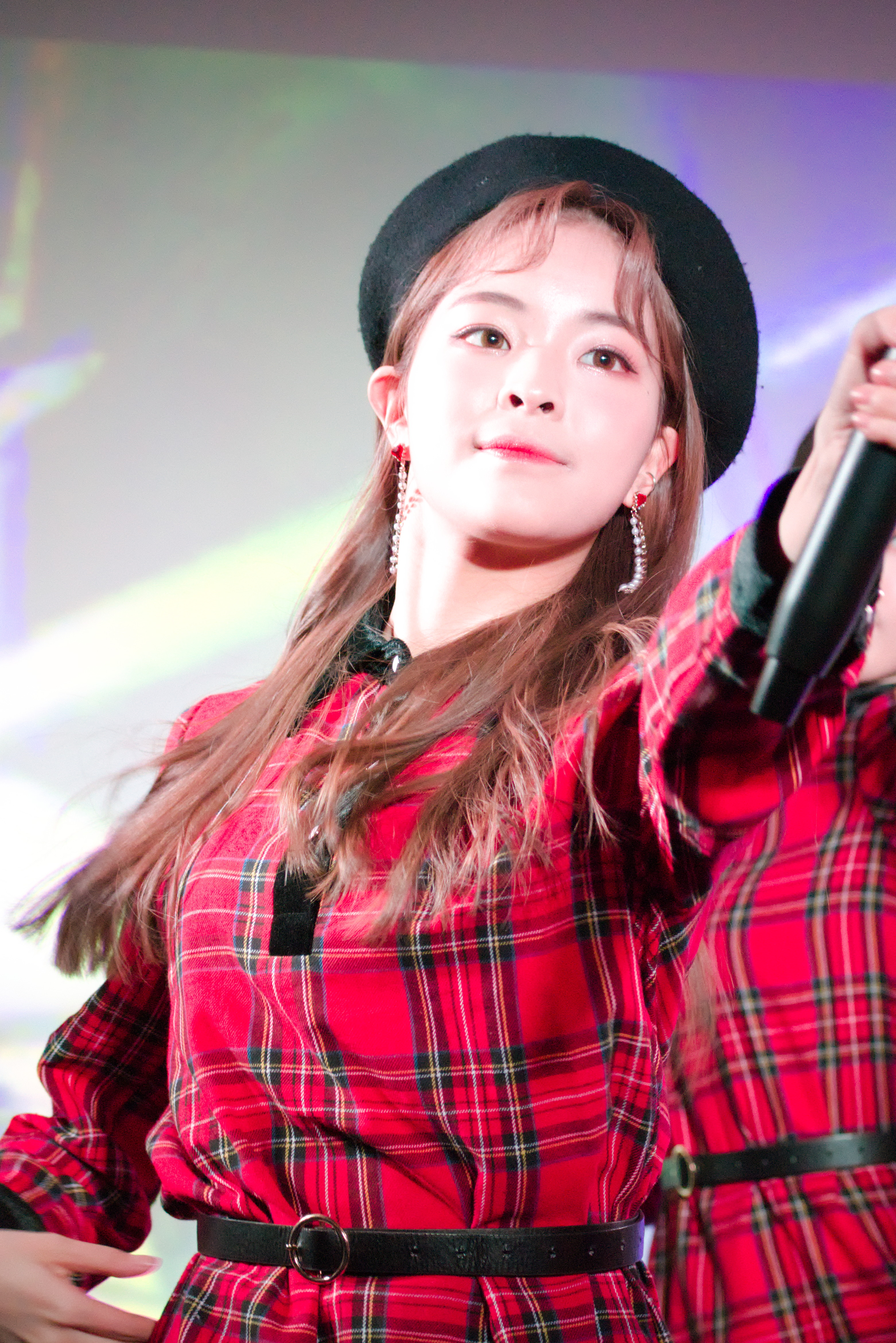 S.I.S CHRISTMAS CONCERT 20181225 2部 エン